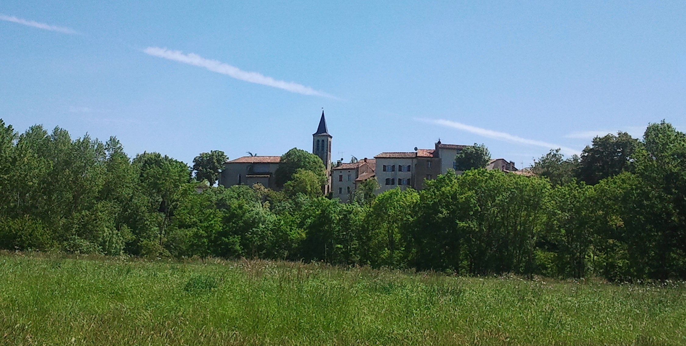 Vue générale de Montdragon